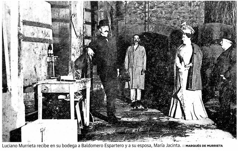 El Marqués de Murriera Luciano Murrieta, Baldomero Espartero y su esposa Doña María Jacinta de Sicilia en las bodegas Marques de Murrieta cerca de Logroño (La Rioja, España)